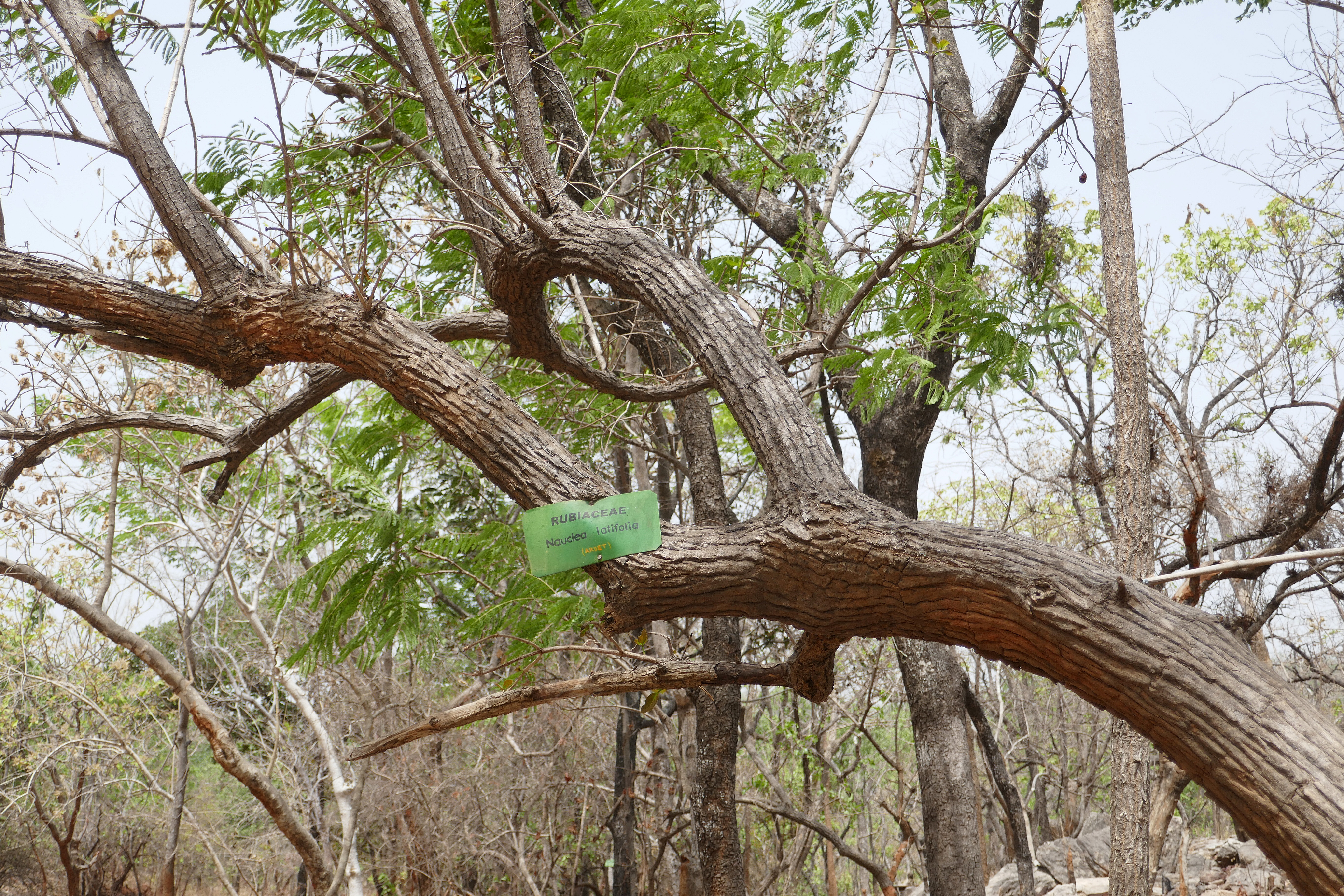 Nauclea latifolia au Bénin, dans l'Atakora, à proximité des chutes de Kota.